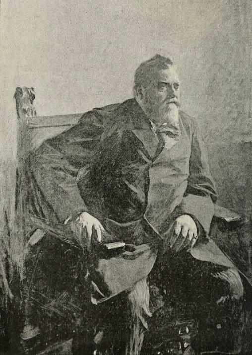 M. Spuller